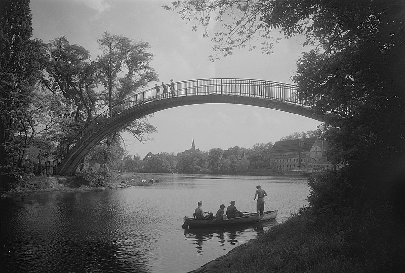 Original image description from the Deutsche Fotothek Forstwerderbrücke (1928). Fußgängerbrücke über einen schiffbaren Saalearm